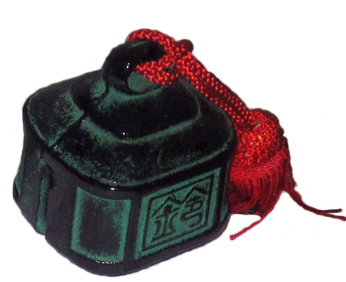 駅鈴（和田山郷土歴史館）